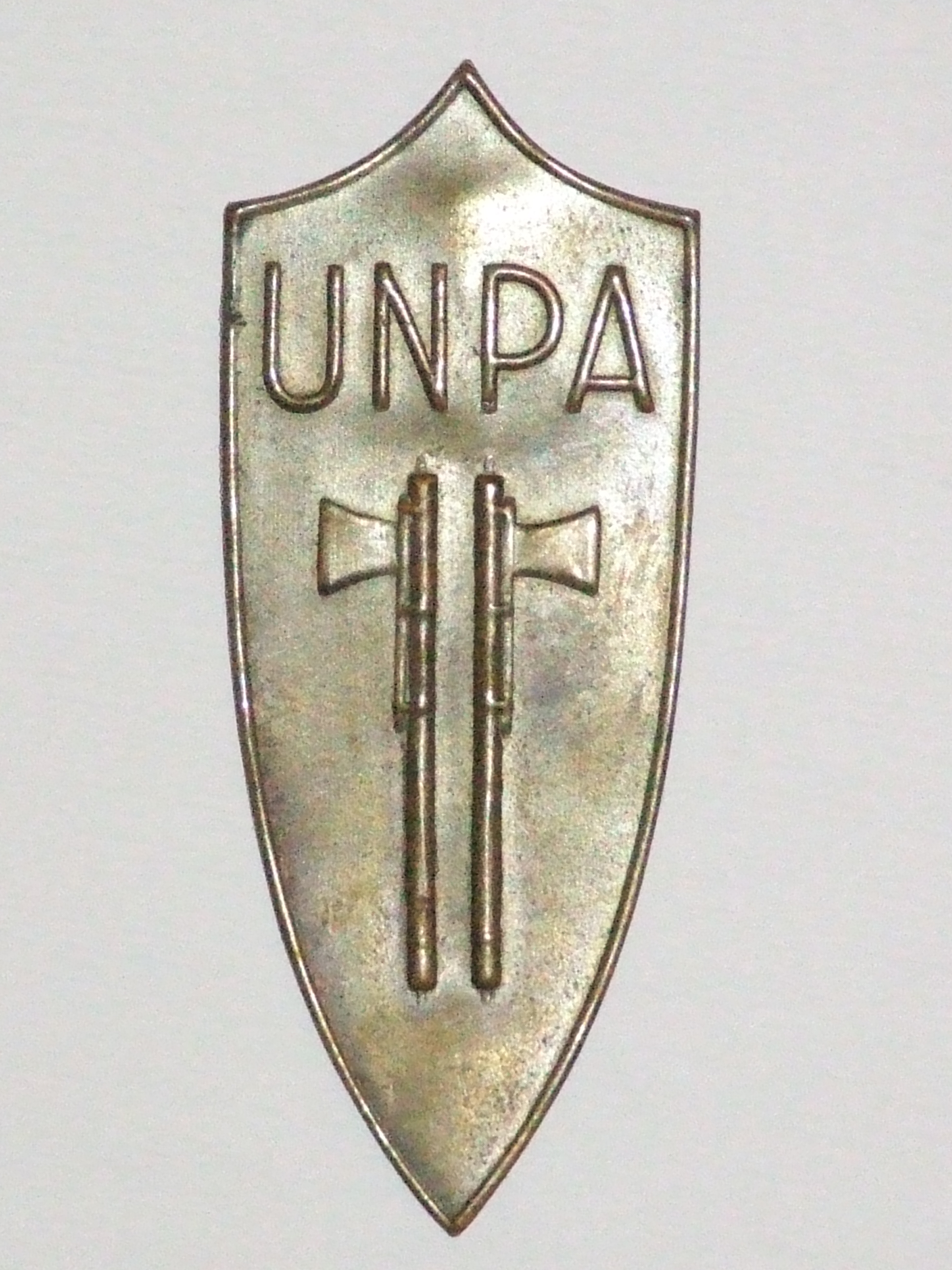 Distintivo oiginariamente applicato sulla fibbia del cinturone 'porta piccozza' (o sul braccio) di volontario dell'organizzazione UMPA, Italia, seconda guerra mondiale. Oggetto di propria proprietà.